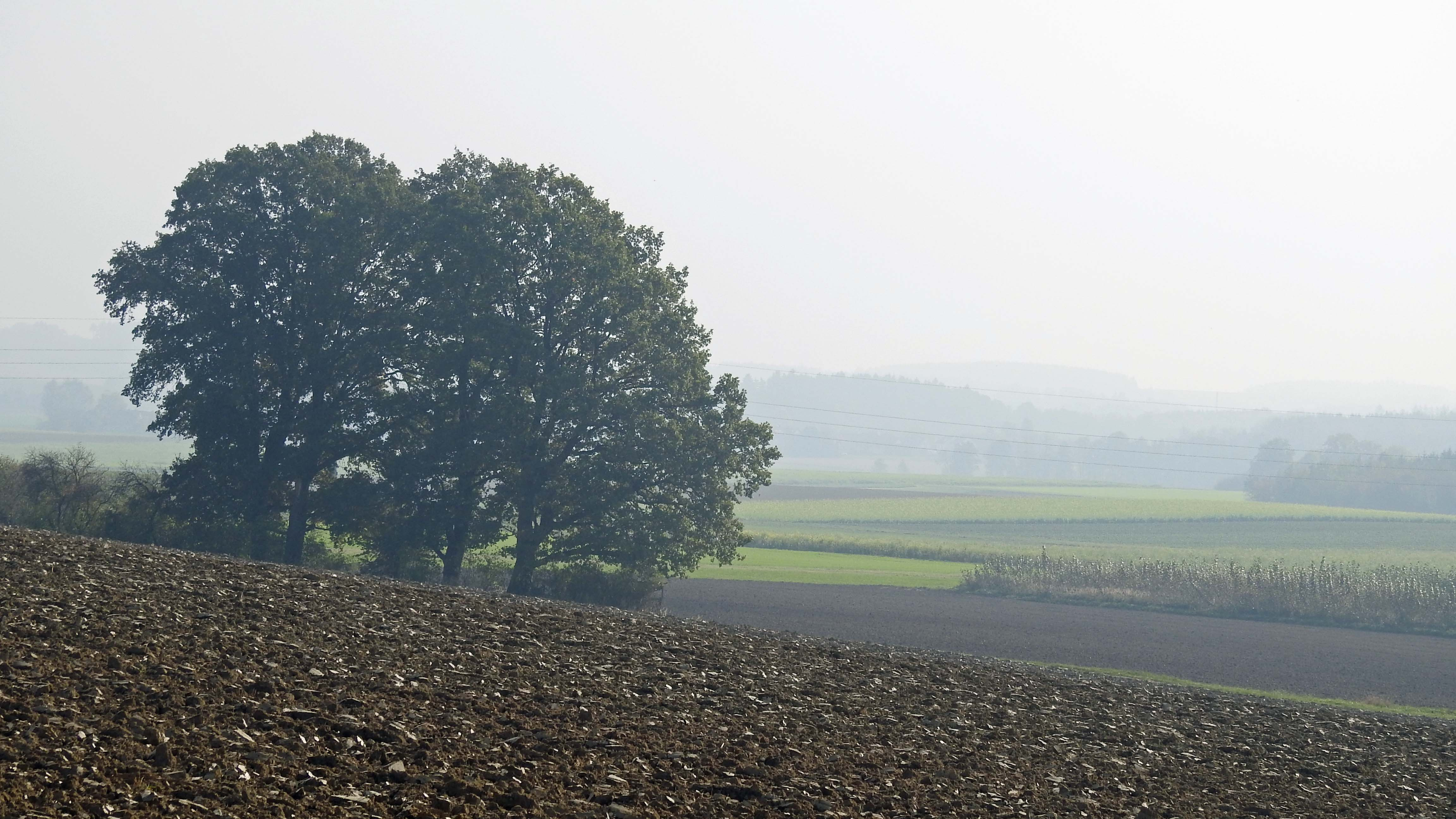 An der herbstlichen Glonn bei Bayerzell